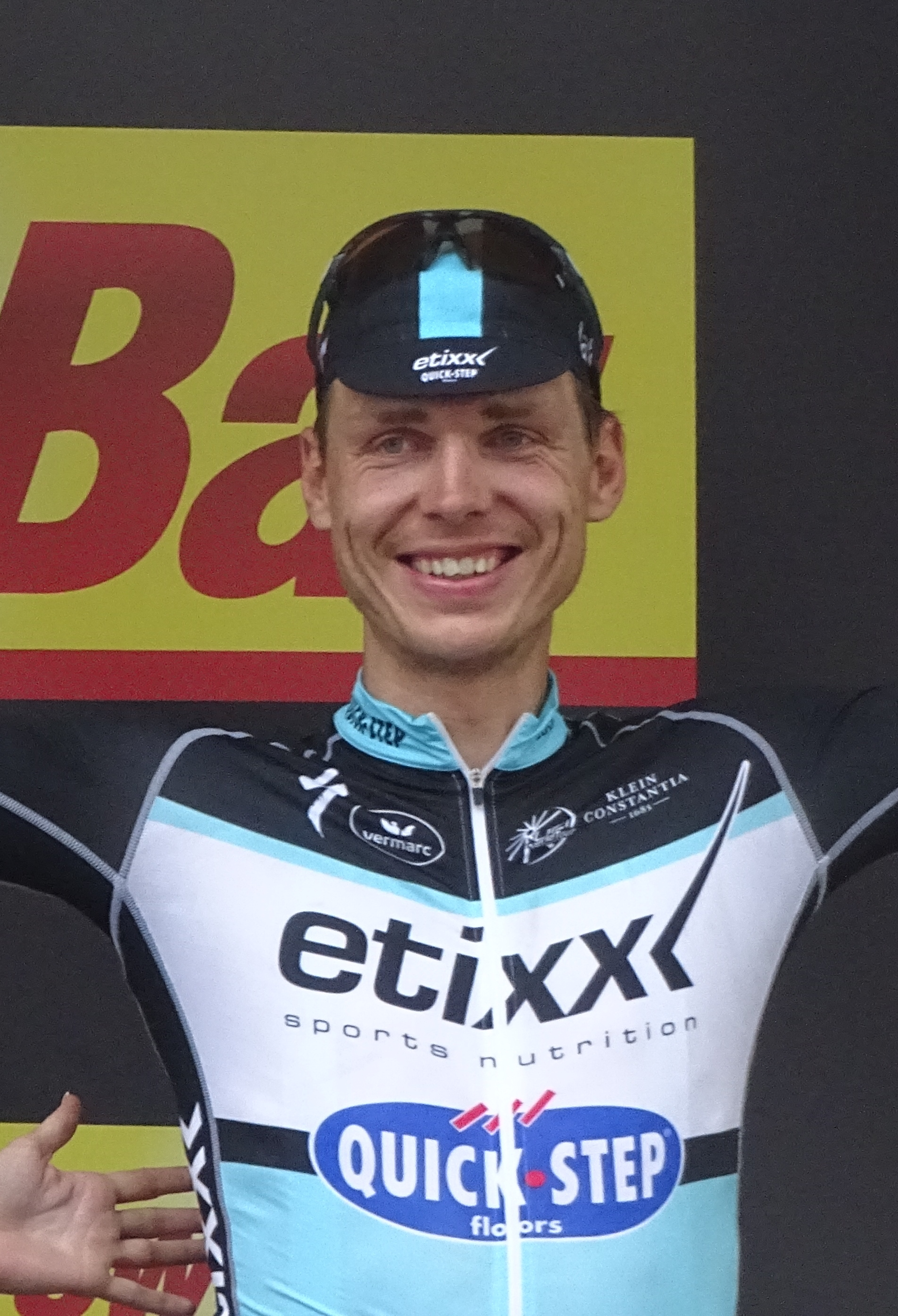 Reportage réalisé le mardi 7 juillet à l'occasion de l'arrivée de la quatrième étape du Tour de France 2015 à Cambrai, Nord-Pas-de-Calais, France.